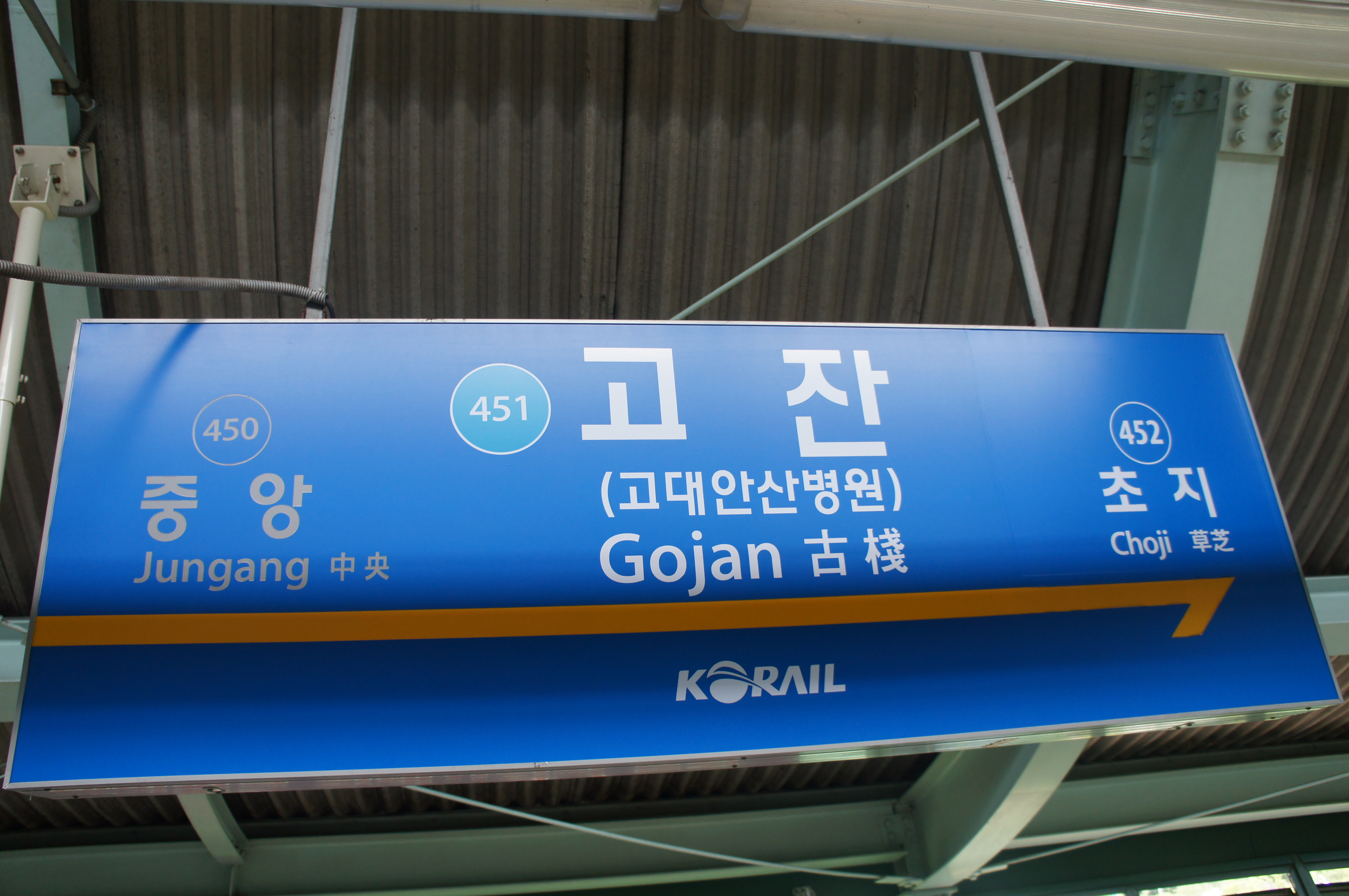 고잔역 역명판